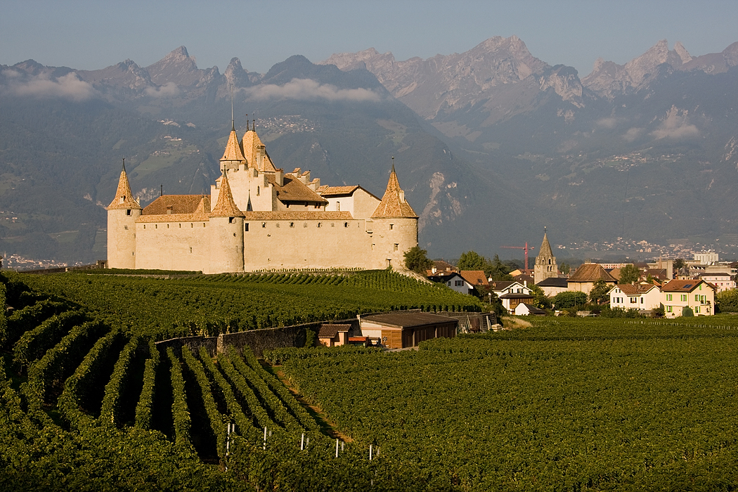 Château d'Aigle (Schloss Aigle)